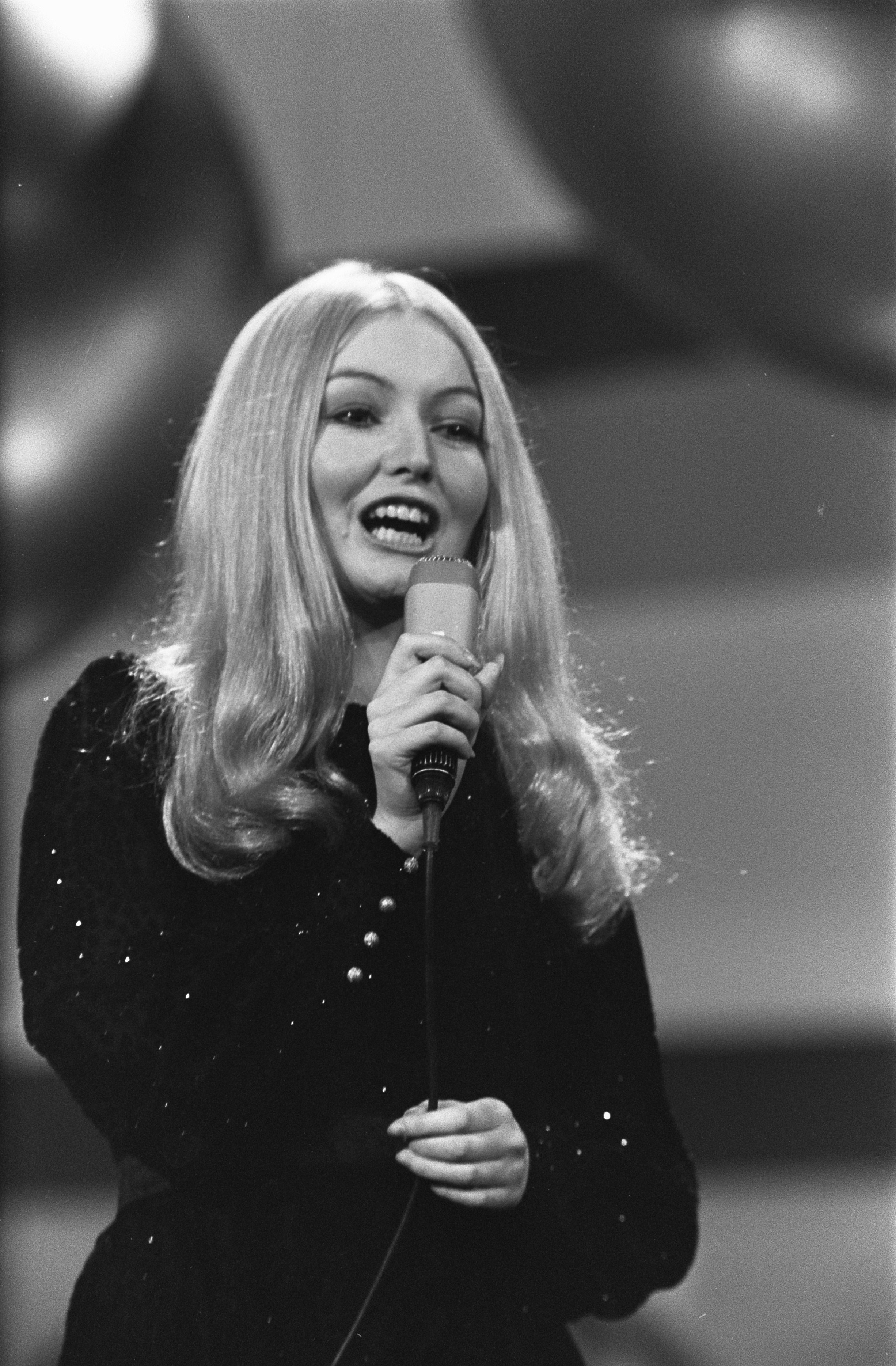 Collectie / Archief : Fotocollectie Anefo Reportage / Serie : [ onbekend ] Beschrijving : Mary Hopkin Datum : 21 maart 1970 Locatie : Amsterdam, Noord-Holland Trefwoorden : artiesten, songfestivals, zangers Persoonsnaam : Hopkin, Mary Instellingsnaam : Eurovisie Song Festival Fotograaf : Koch, Eric / Anefo Auteursrechthebbende : Nationaal Archief Materiaalsoort : Negatief (zwart/wit) Nummer archiefinventaris : bekijk toegang 2.24.01.05 Bestanddeelnummer : 923-3713 Reacties Geplaatst door Musiclady op 28 juli 2016 - 09:41. deelneemster voor Engeland Mary Hopkin zingt 'Knock knock'. Persoonsnaam: Hopkin, Mary NB. Zij werd tweede op dit 15-e Eurovisie Songfestival.